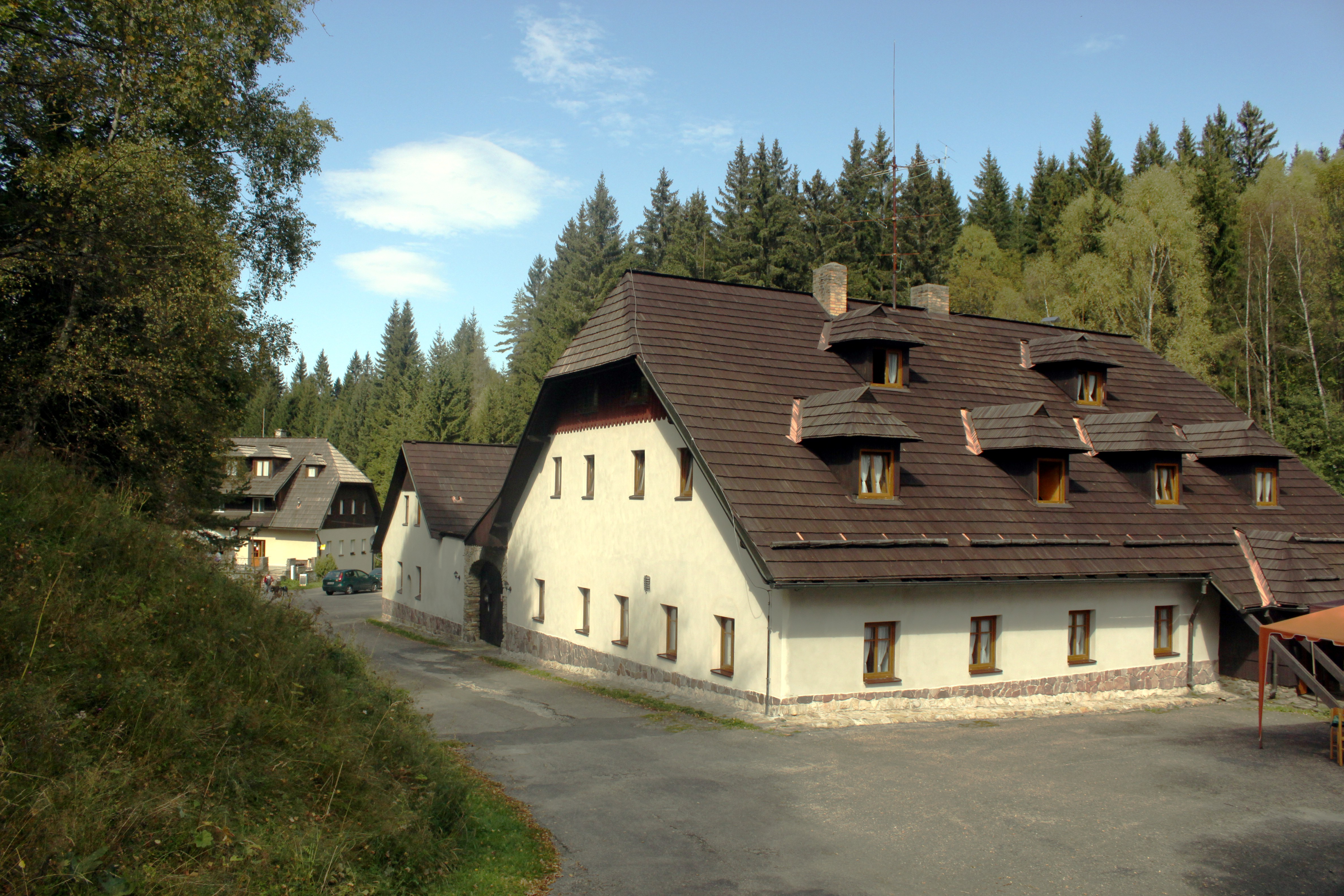 Osada Popelná (obec Nicov), okres Prachatice